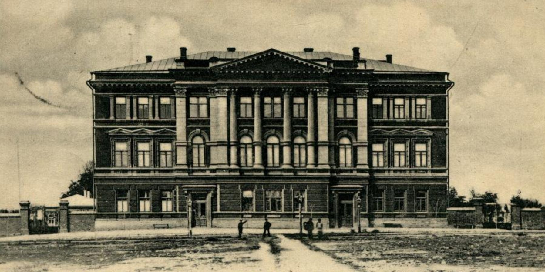 Здание Высшего начального 4-классного женского училища (прогимназии), Таганрог